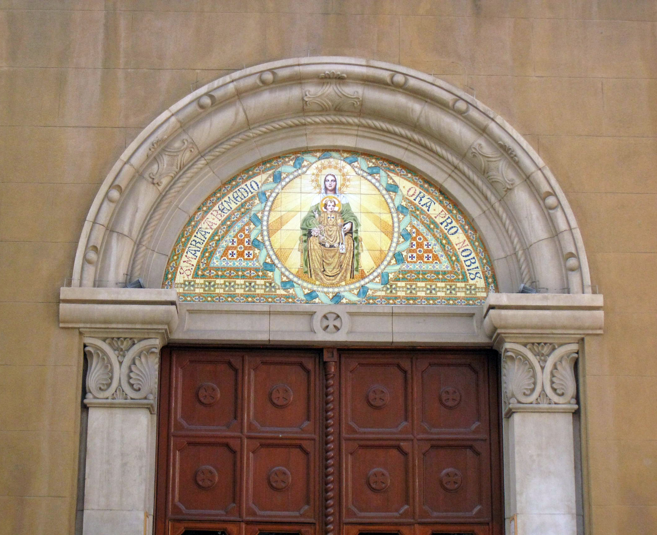 Parròquia de Santa Maria del Remei (Barcelona)